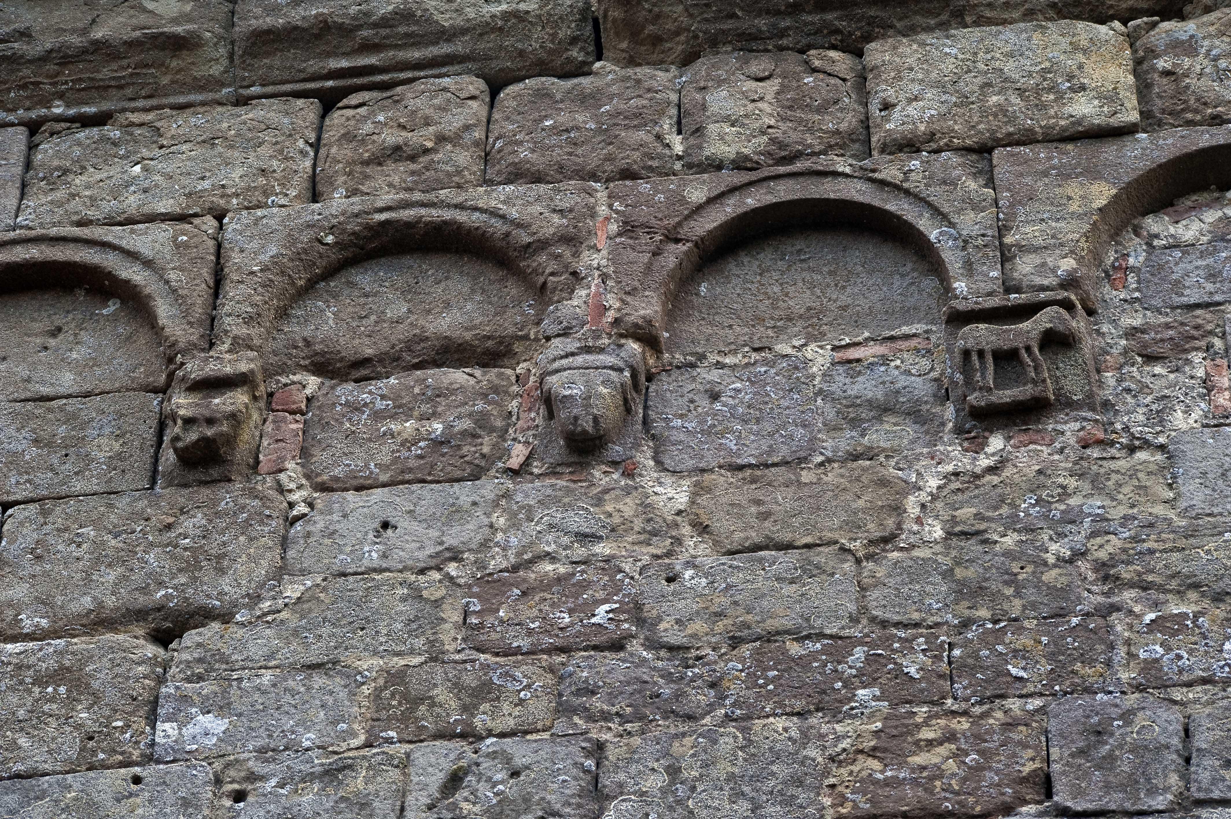 Particolare del coronamento scolpito con figure zoomorfe della fiancata settentrionale della chiesa di San Donato a Lucardo (Certaldo)